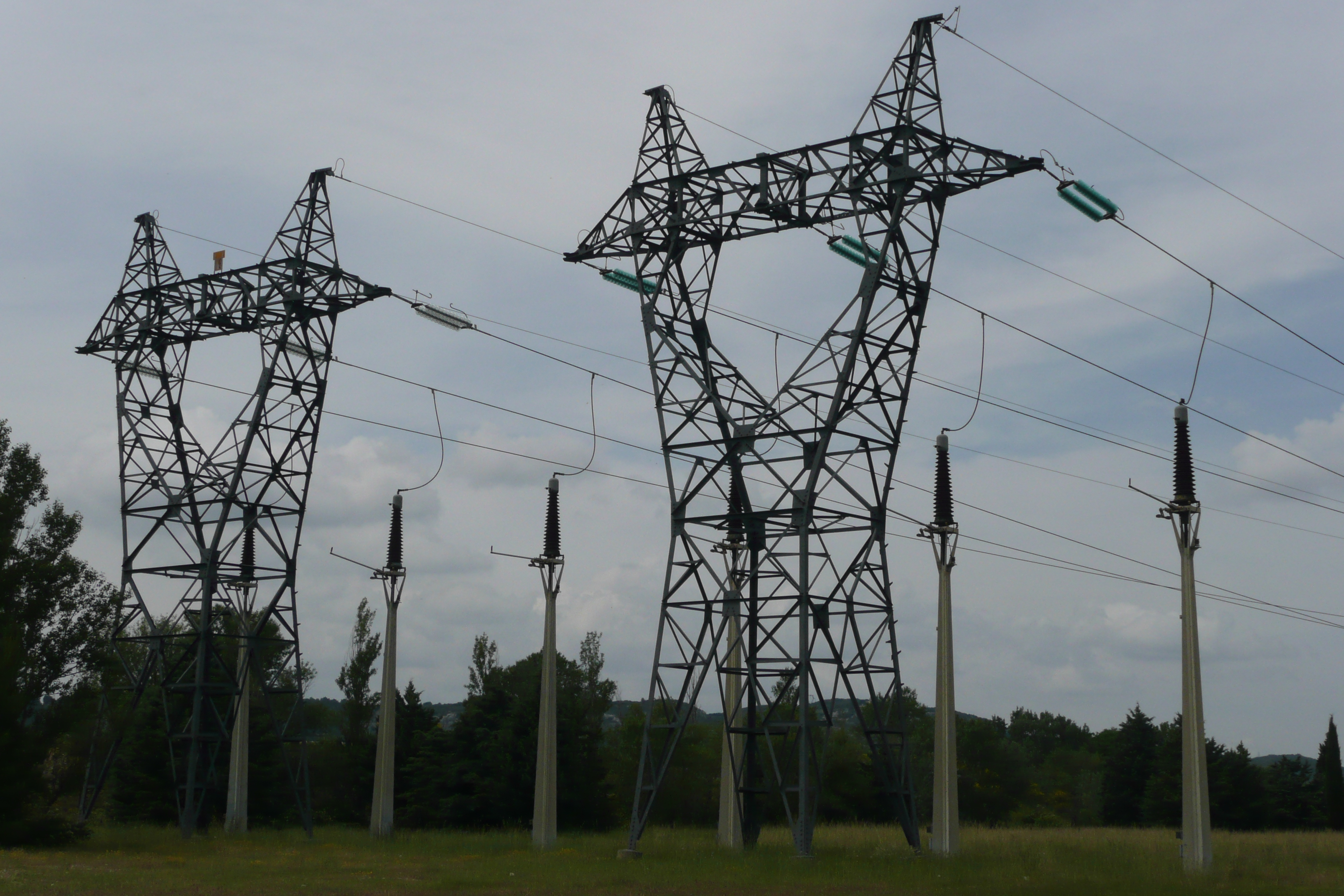 Ligne haute tension de la Compagnie nationale du Rhône, 1973, usine écluse d'Avignon.